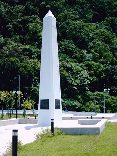 臺灣鐵路管理局和平車站外的北迴鐵路工程殉職人員紀念碑。